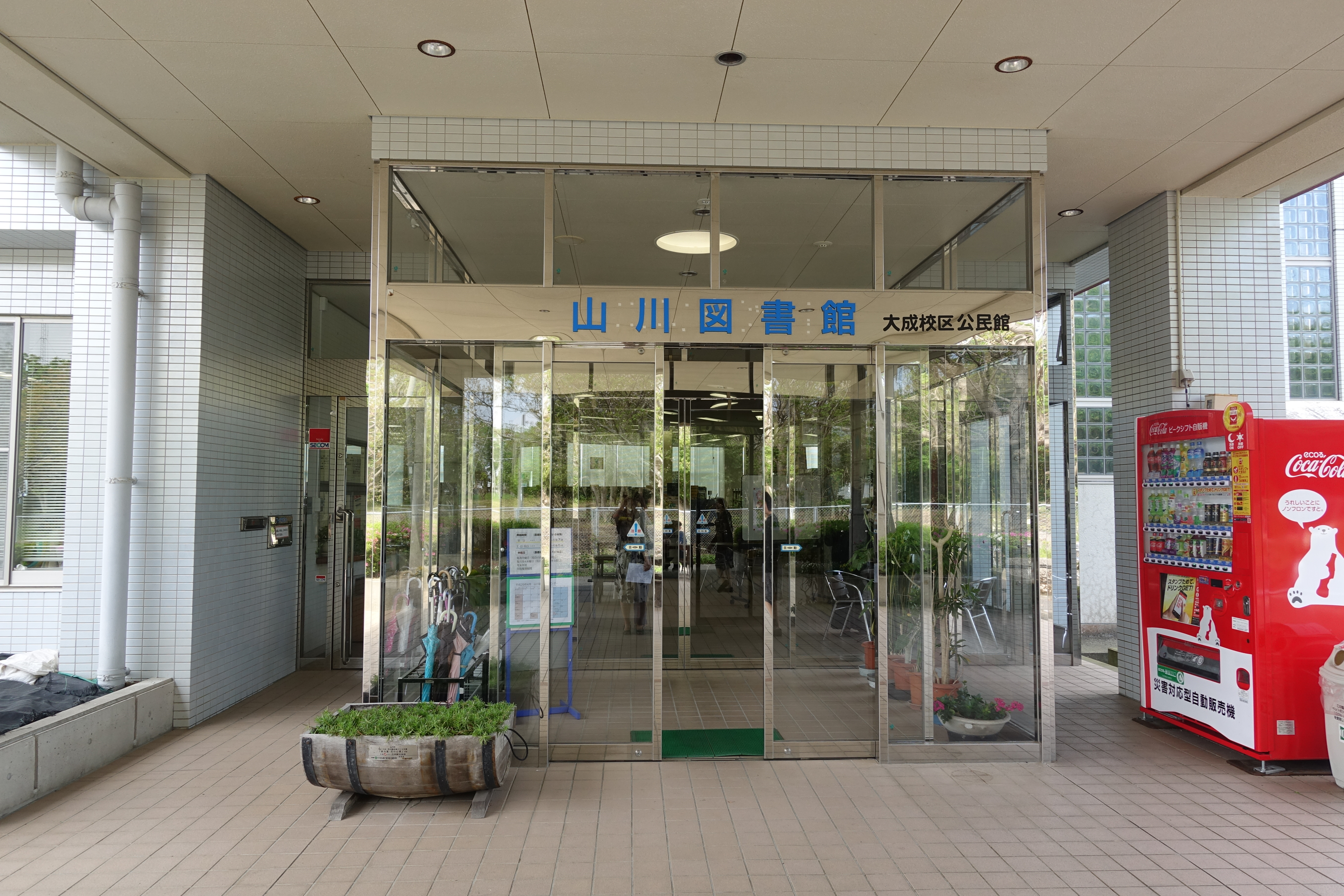 鹿児島県指宿市にある山川図書館の外観